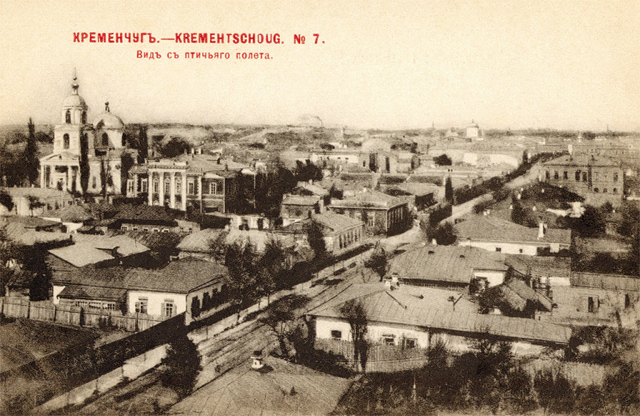 Postcards of old Kremenchuk & Krukov. Кременчук. Погляд з пташиного польоту.